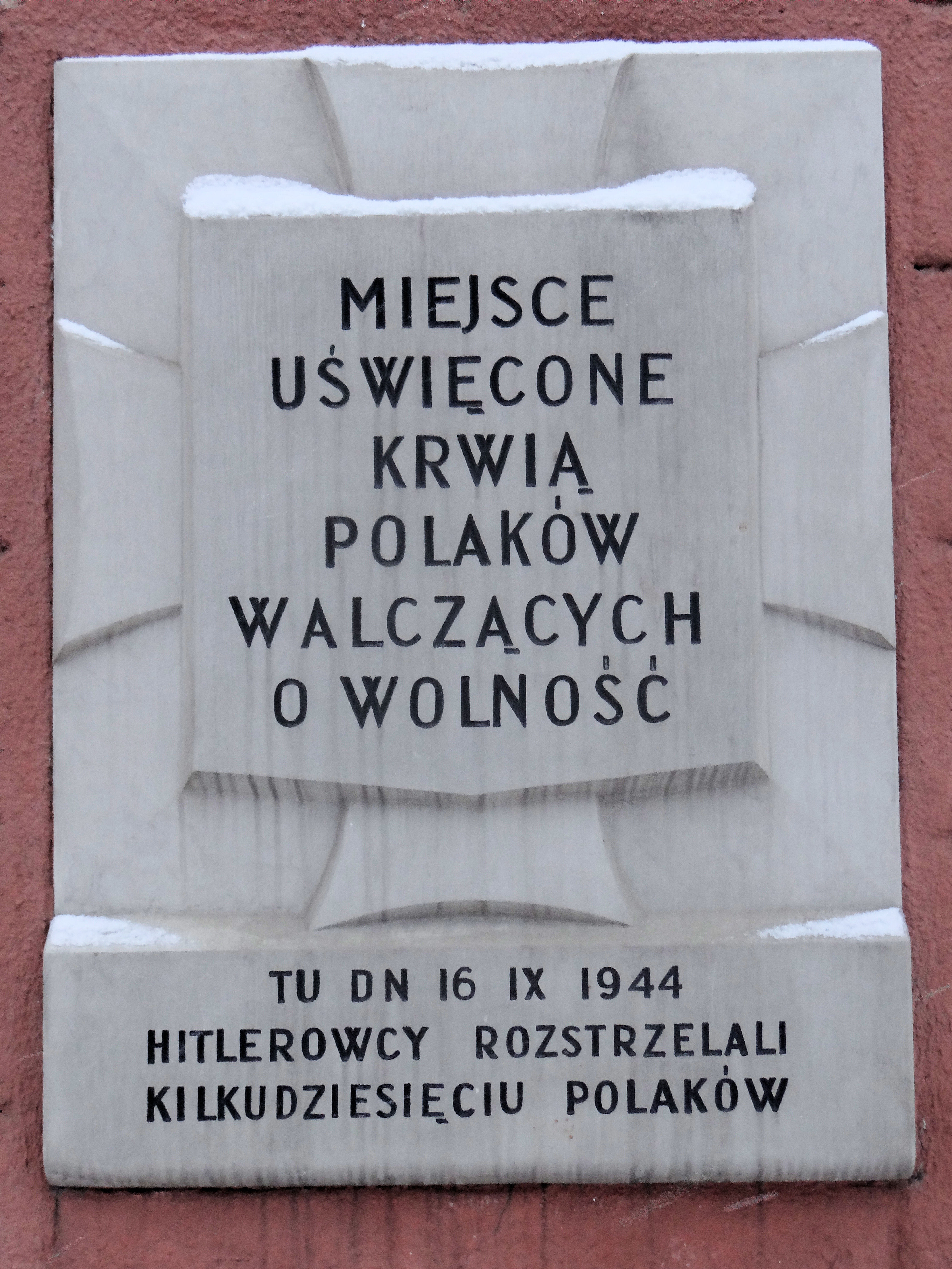 W tym miejscu 16-IX-1944 r hitlerowcy rozstrzelali kilkudziesięciu Polaków (al Solidatności 90 dawniej ul. Leszno)